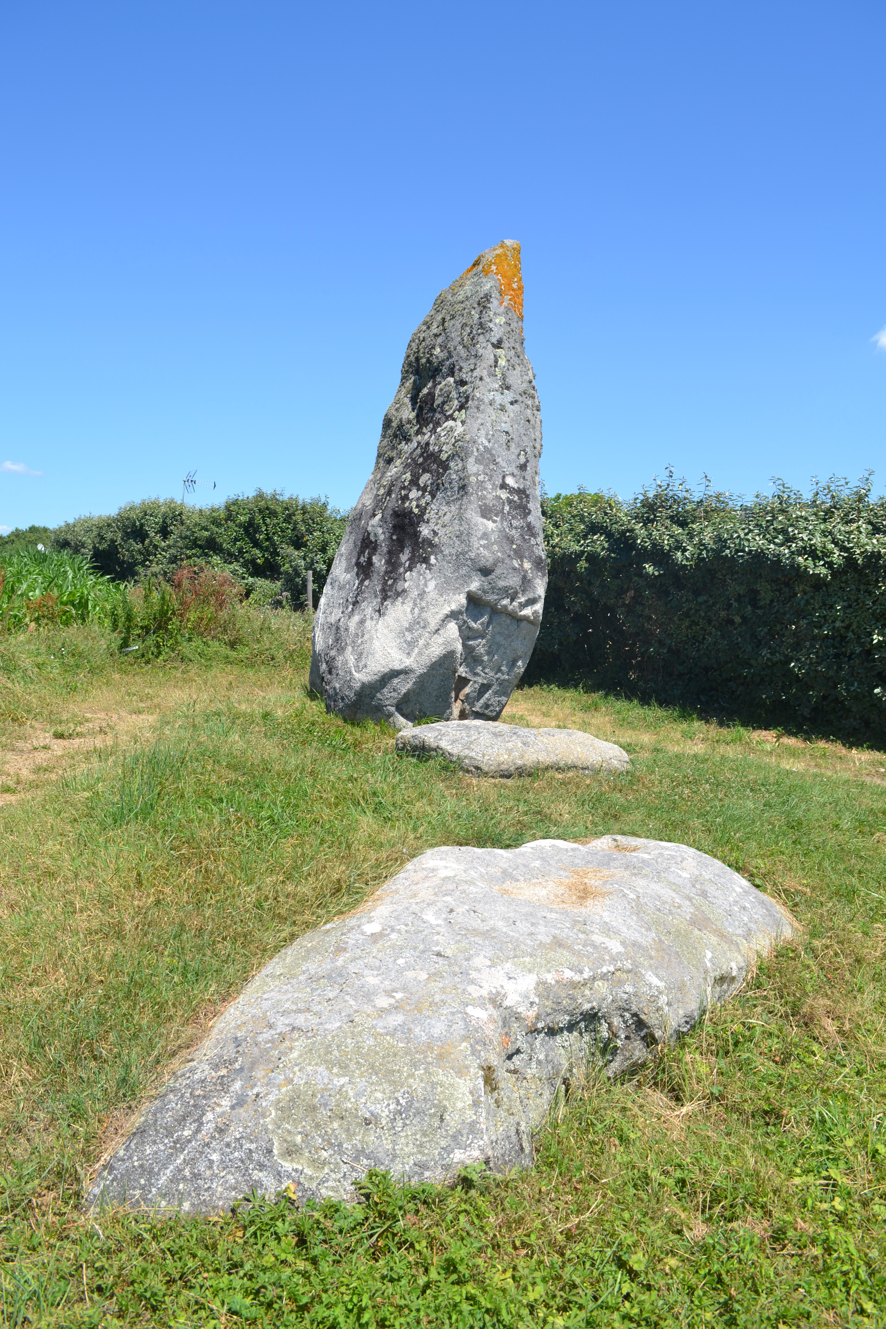 Menhir de Courégant à Plœmeur (56).